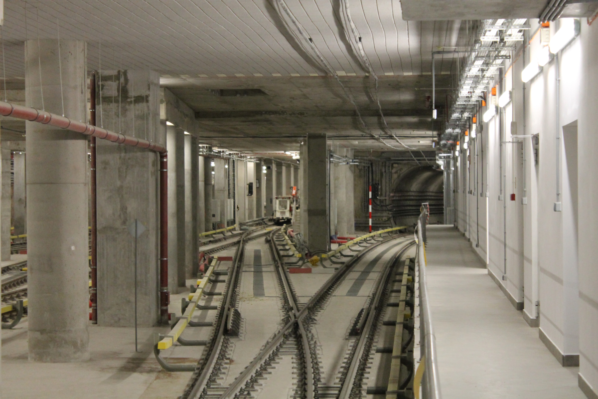 Tory odstawcze na zachód od stacji C14 Stadion Narodowy.